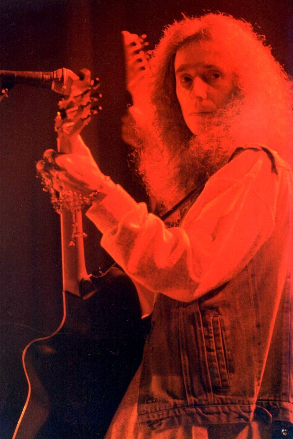 Z koncertu Petra Kapinuse se skupinou Bagr